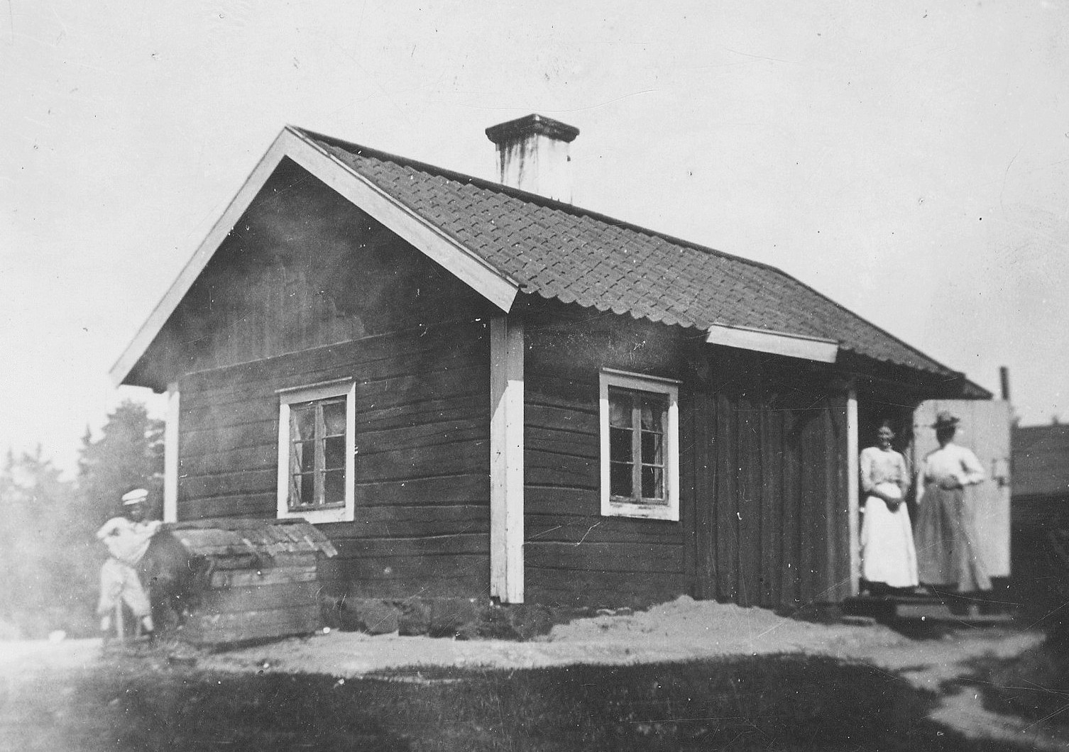 Gamla torpet "Kärrtorp", t.h. skymtar "Lillstugan". Kärrtorp lydde under Hammarby gård